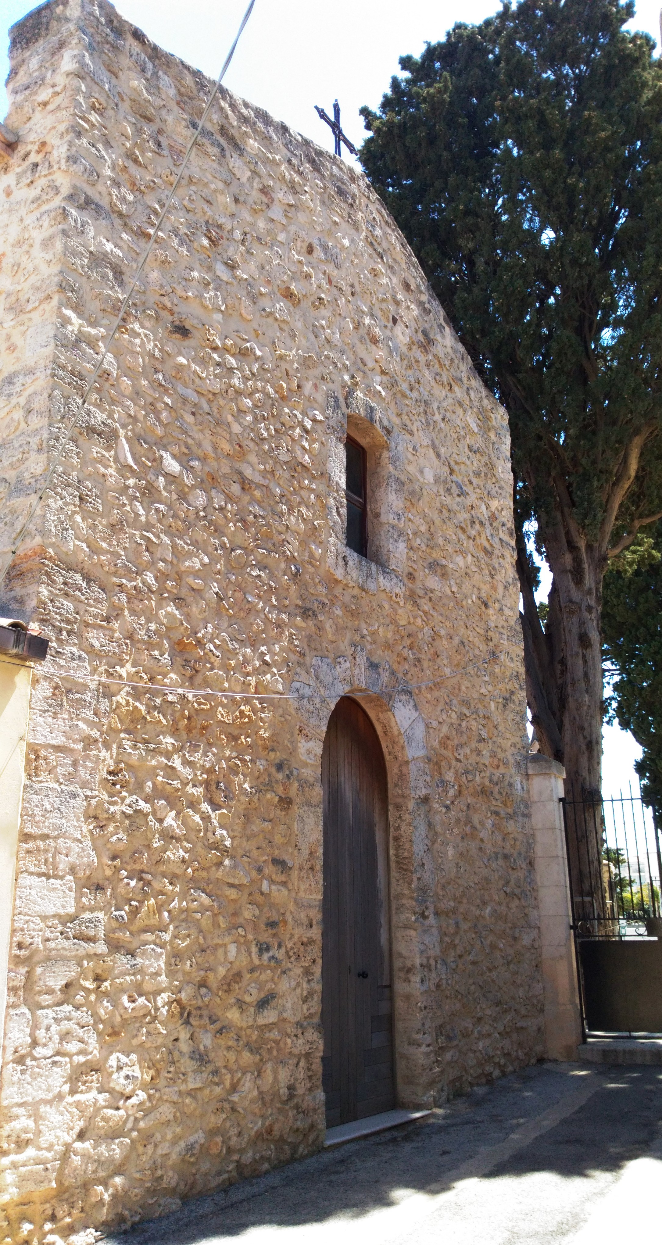 Facciata